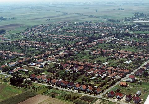 Városföld, Hungary, aerialphotgraphy